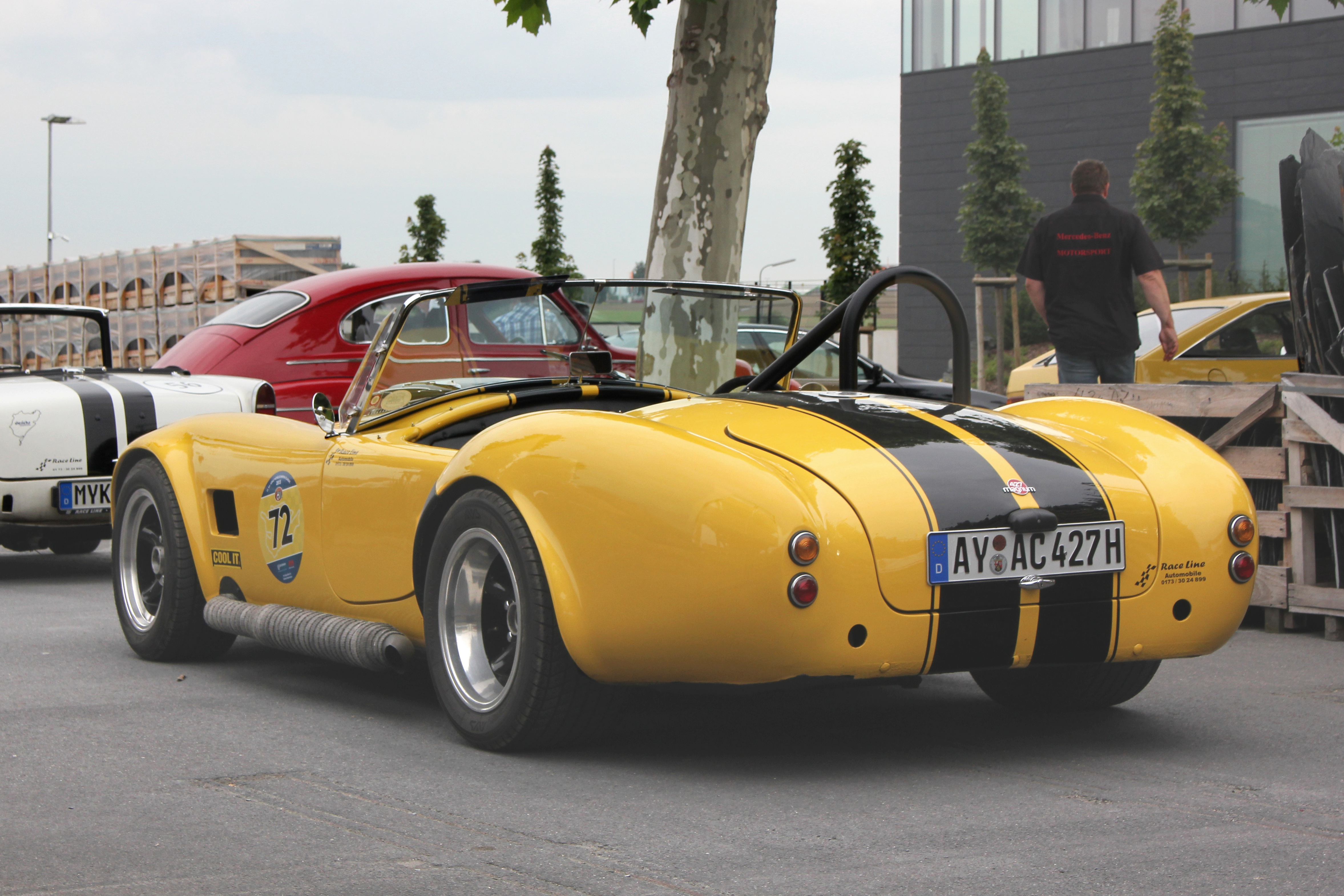 AC Cobra 427 Replica Magnum (Kennzeichen des Fahrzeugs verändert)